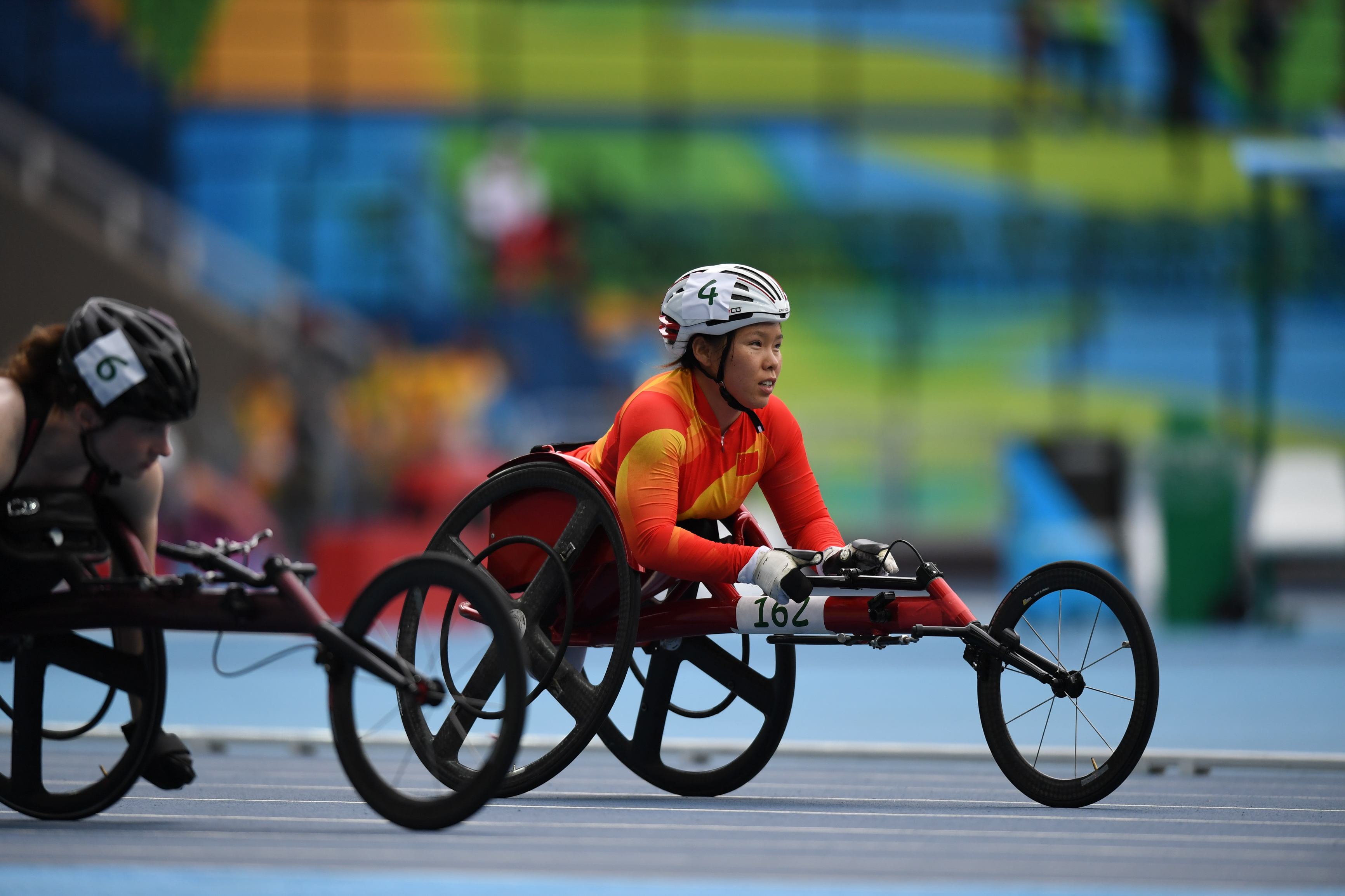 Rio de Janeiro - Prova feminina de 100 metros T53, no primeiro dia das provas de atletismo nos Jogos Paralímpicos Rio 2016 (Tânia Rêgo/Agência Brasil)